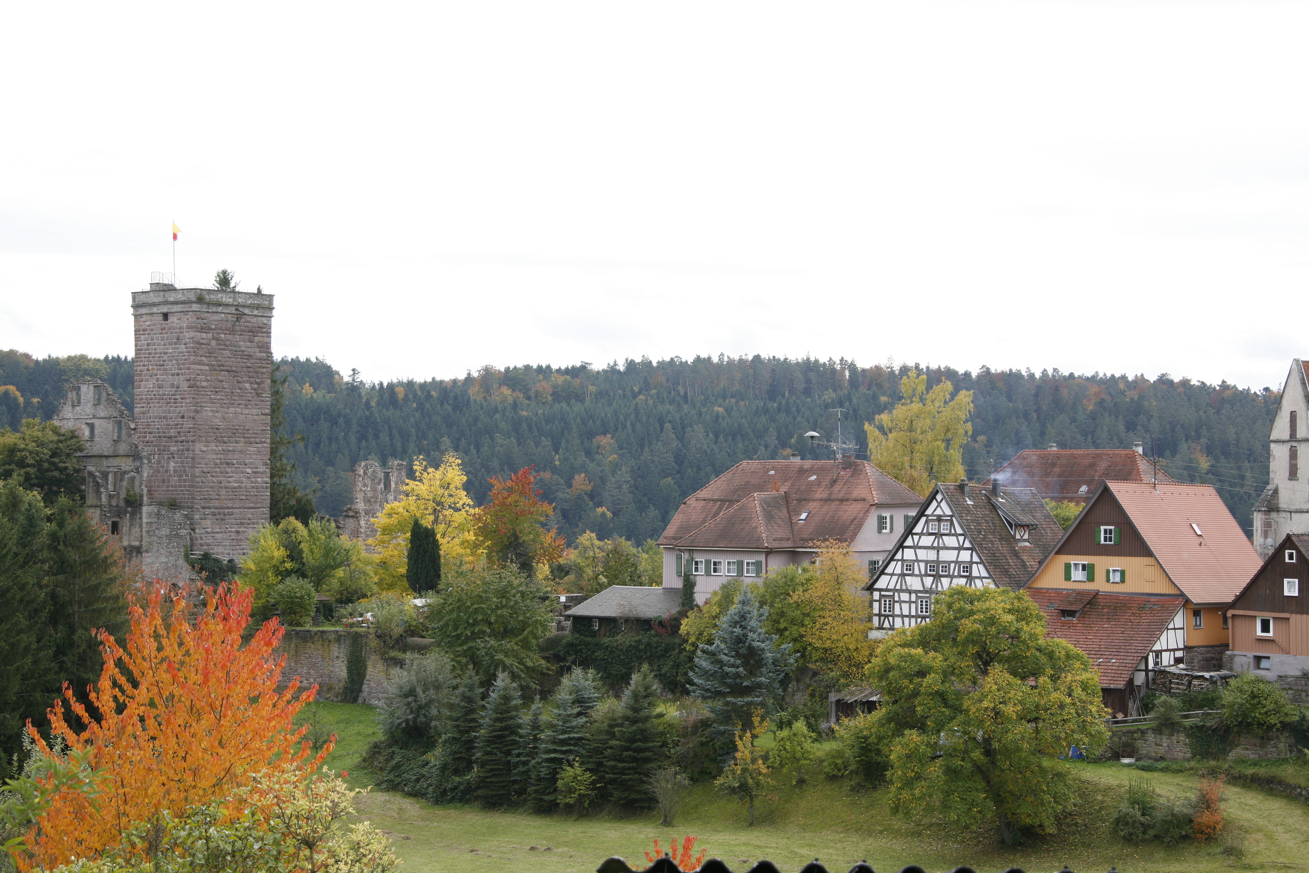 Herbstimpression vom Zavelsteiner Städtle